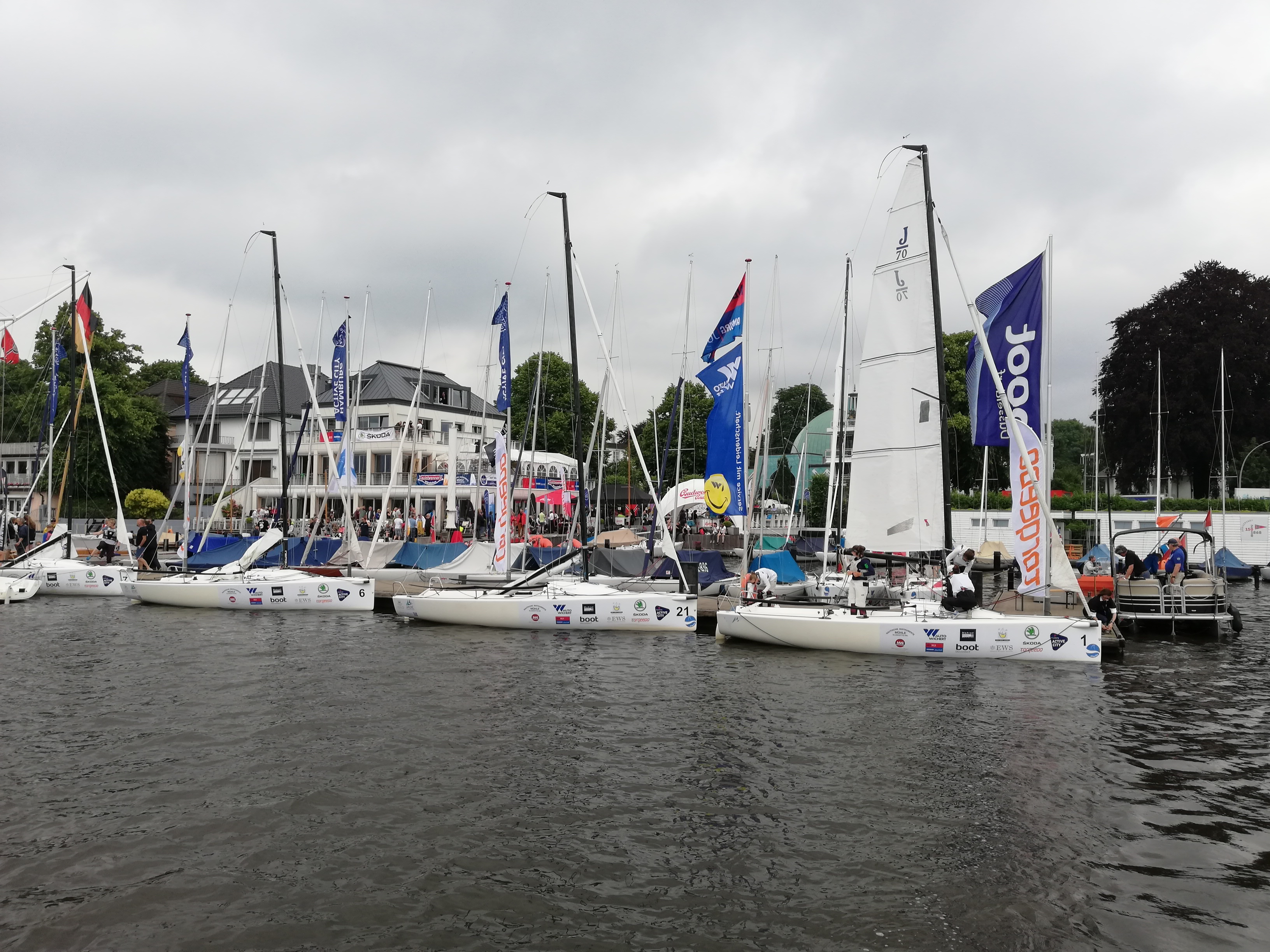 Helga Cup 2019, Norddeutscher Regattaverein (NRV), Clubsteg mit J/70 Teilnehmerbooten, Hamburg, Außenalster